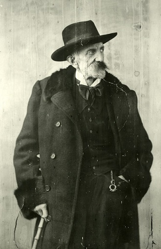 Giovanni Gargiolli